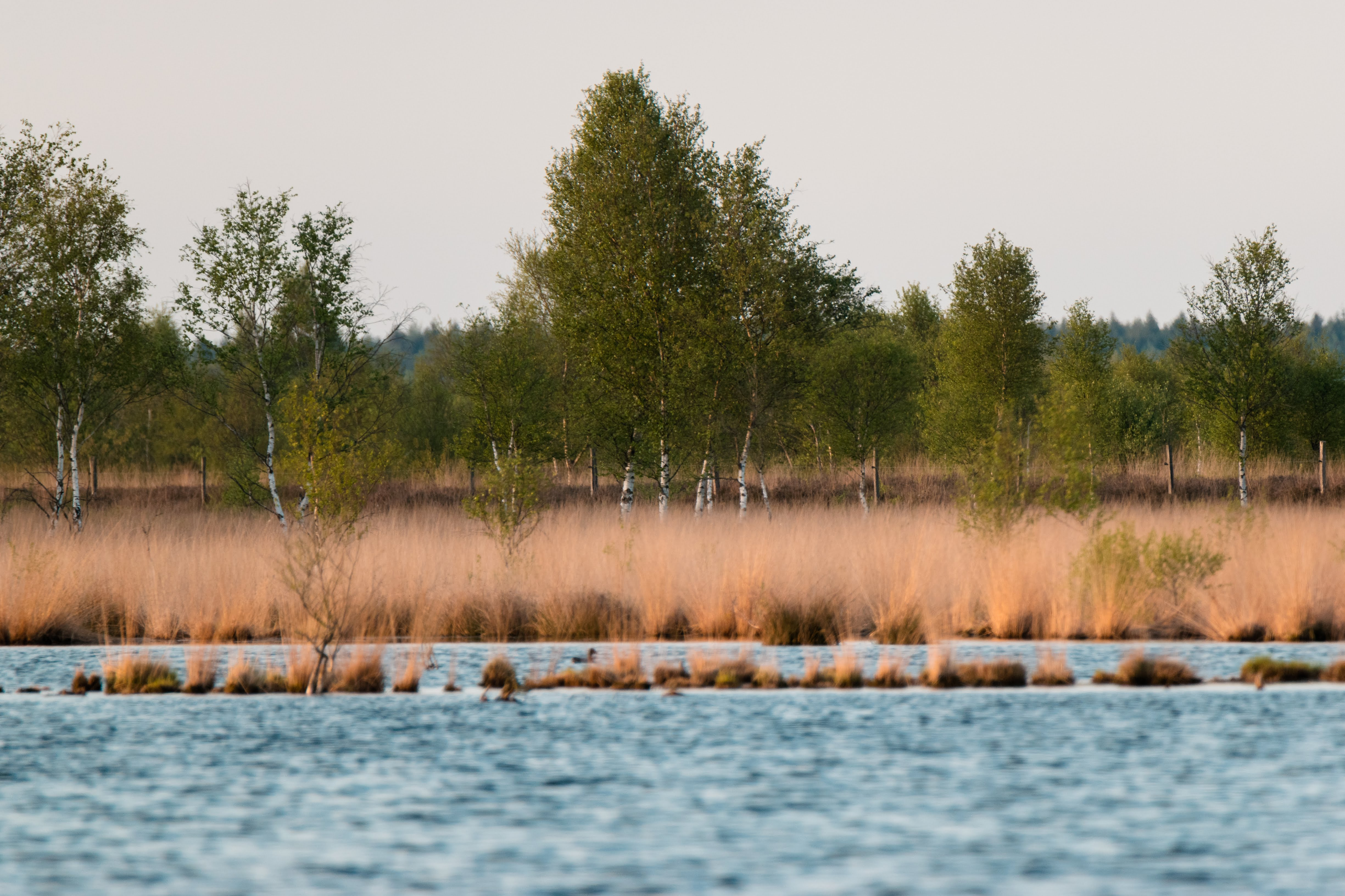 Blick auf das Dalum-Wietmarscher Moor bei Twist